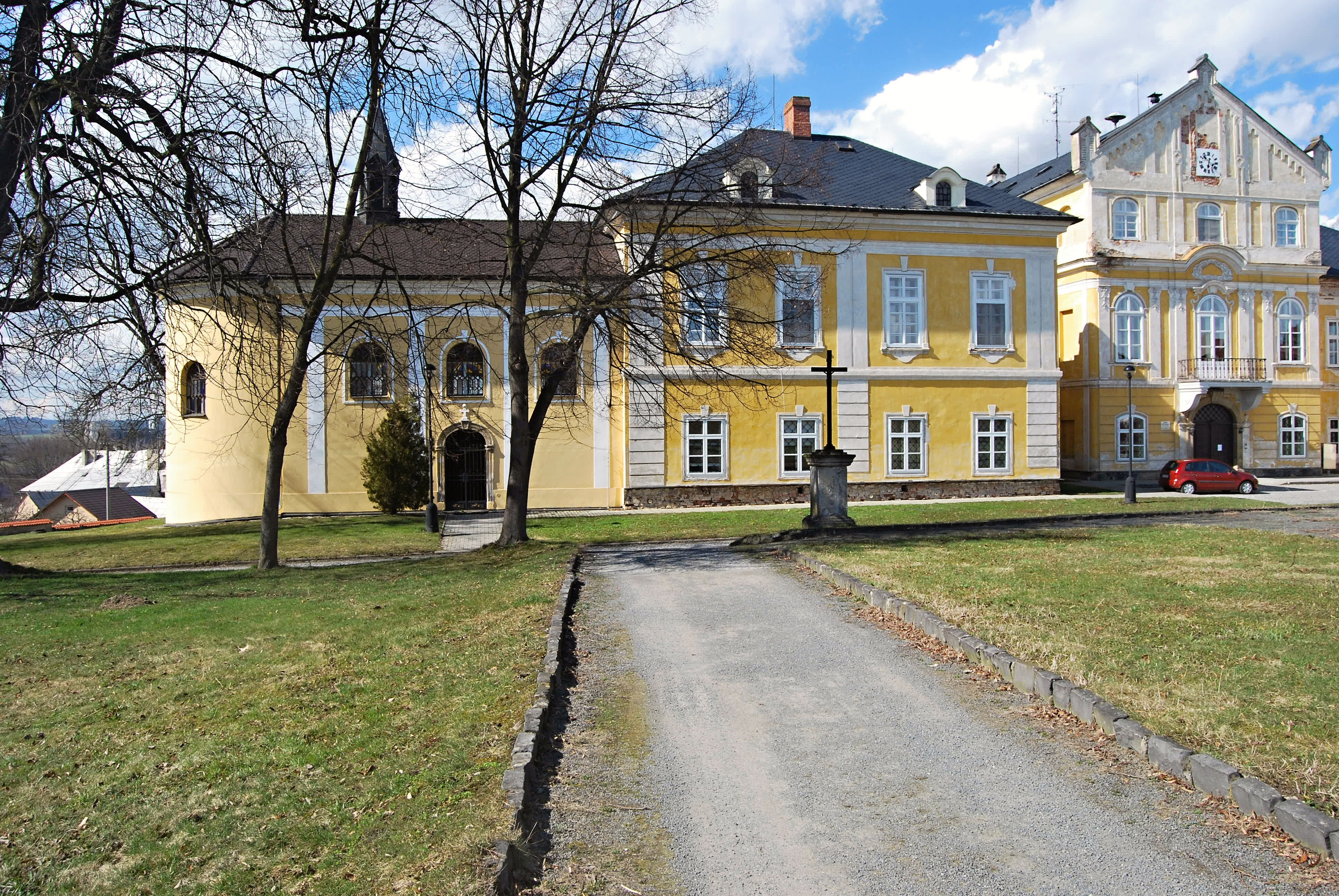 Zámek Nová Horka, Nová Horka 151